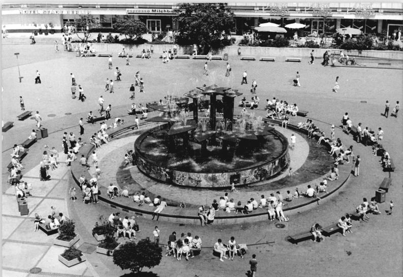 ADN-ZB-Hirndorf-27.7.87-co-Berlin: Alexanderplatz- Der Brunnen der Völkerfreundschaft mitten auf dem Alex ist ein beliebter Treffpunkt und Platz zum Verweilen. Der 1969 nach Entwürfen von Prof. Walter Wommoka entstandene Brunnen ist ein markanter Schmuck im Boulevarderaum des Alexanderplatzes.siehe auch 1987-0827-2N-3N, 5N und 6N